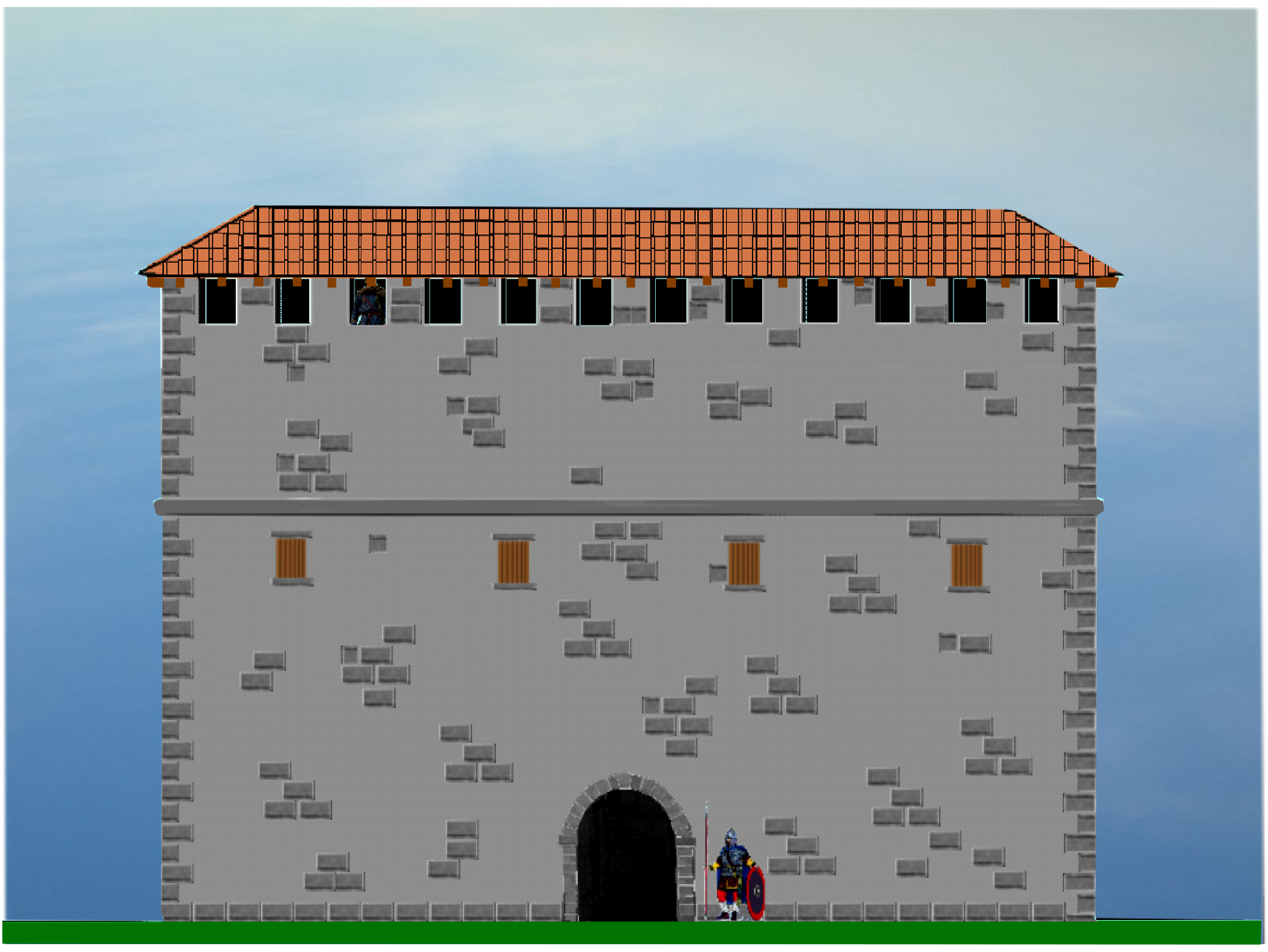 Rekonstruktionskizze des spätrömischen Restkastell Wallsee